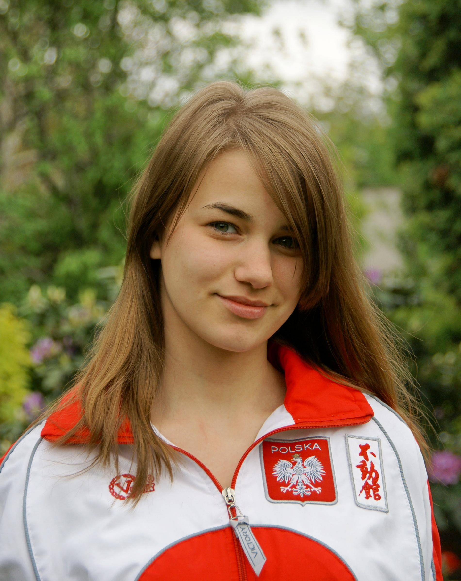 Justyna Laskowska (ur. 15 listopada 1994 w Brodnicy) – polska zawodniczka karate.